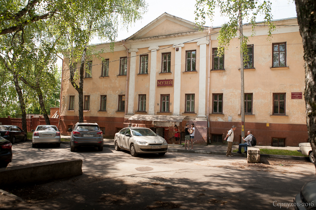 Историко-археологический отдел СИХМ